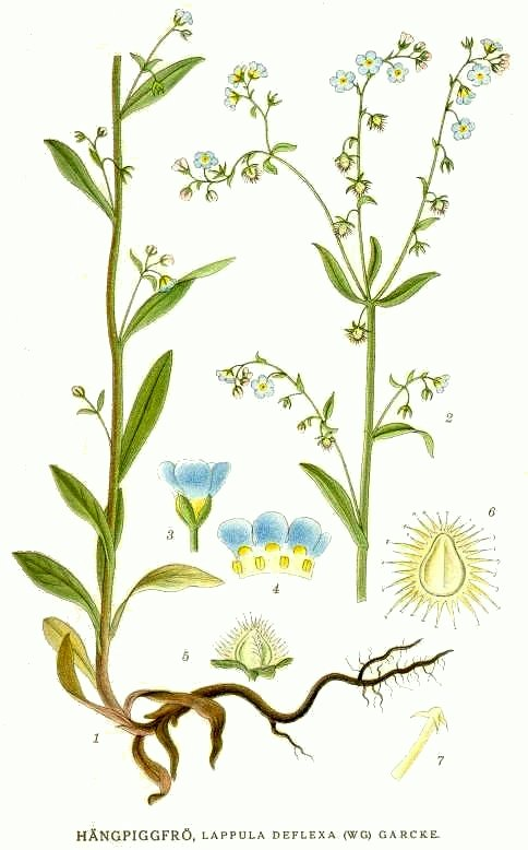 Original Description Hängpiggfrö, Lappula deflexa (WG.) Garcke